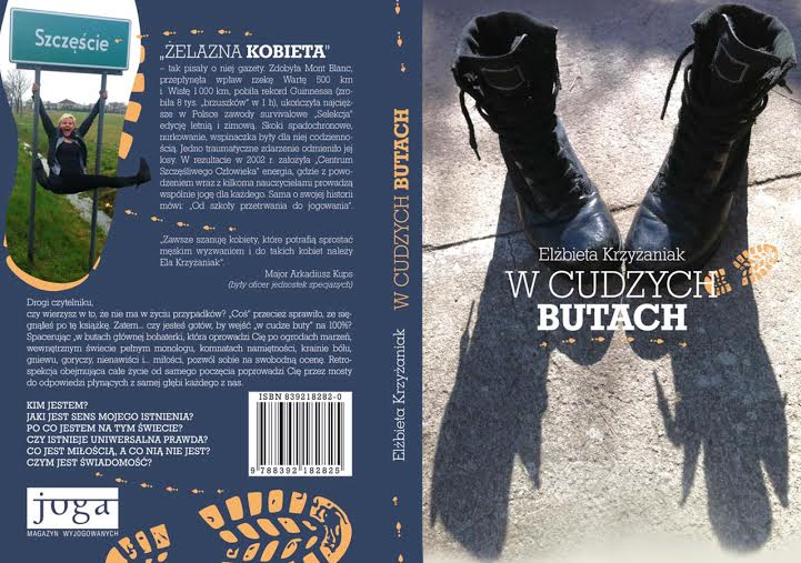 Okładka książki Elżbiety Krzyżaniak-Smolińskiej "W cudzych butach"